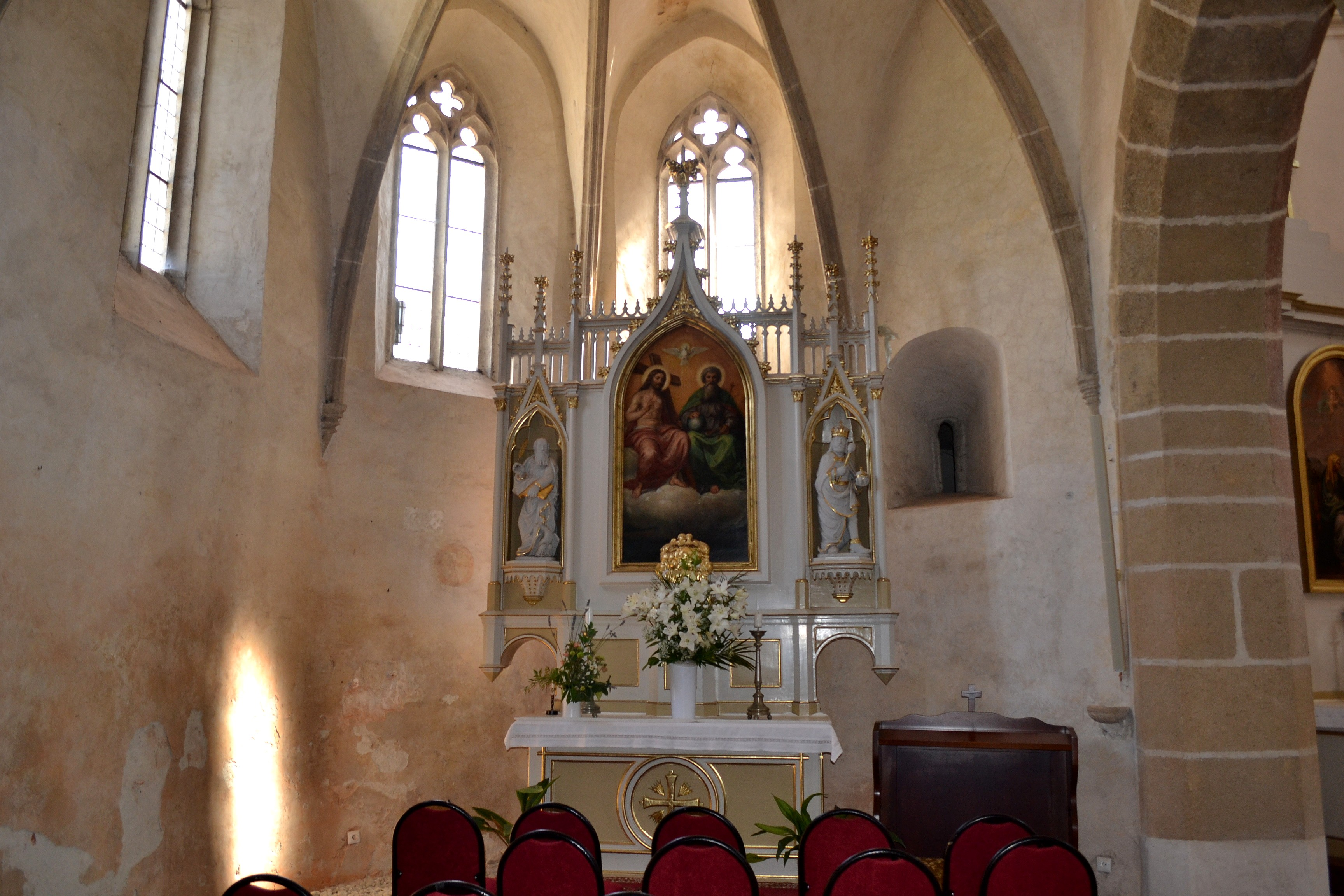 Interiér severnej kaplnky s oltárom. Motívom oltárneho obrazu je Najsvätejšia Trojica